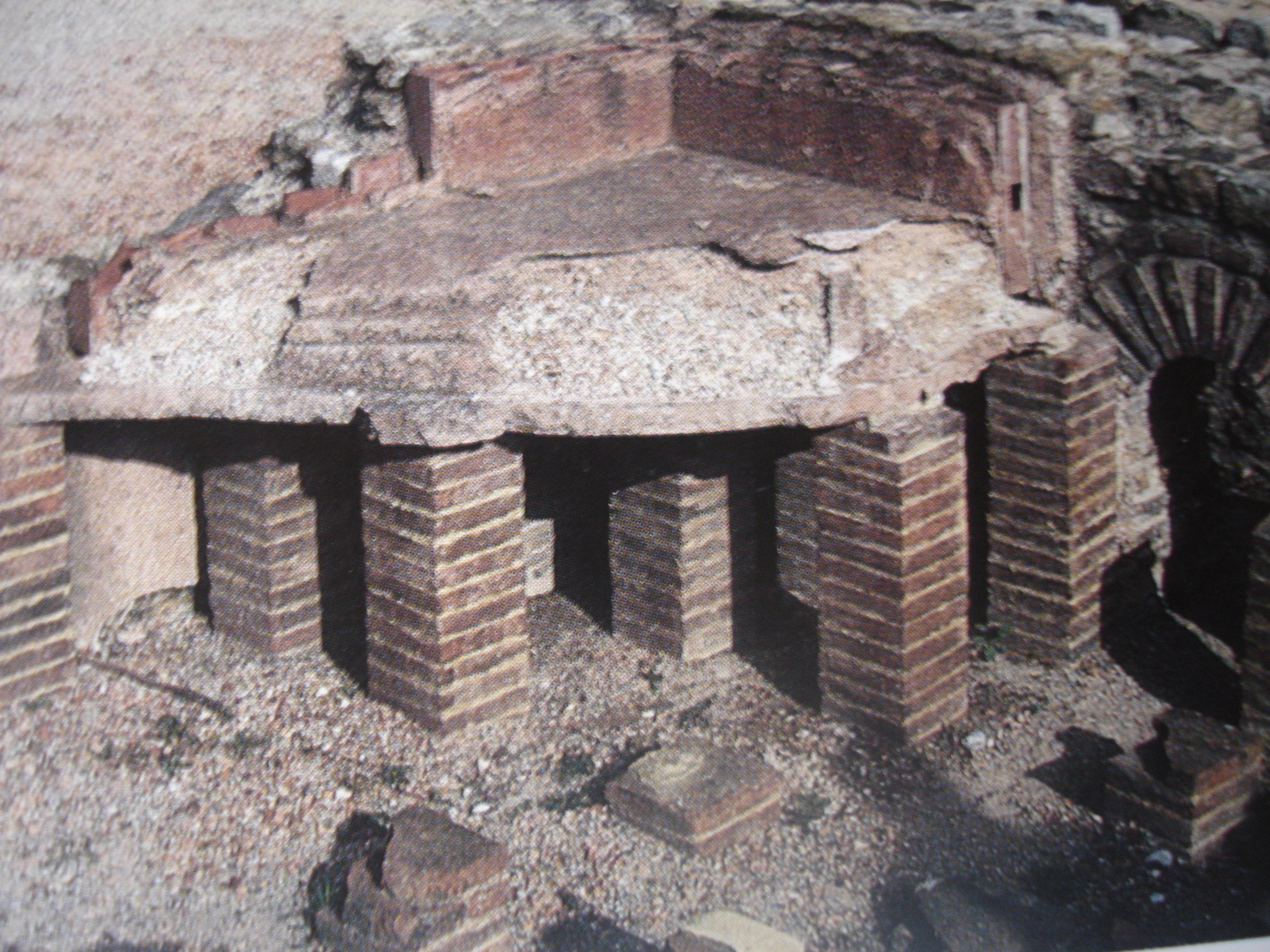 Saint-Romain en gal : hypocauste (système de chauffage par le sol)